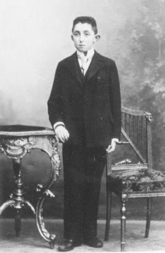 Carl Ehrenstein 1902 (c) Jewish National & University Library, p.o.b. 34165, Jerusalem 91341, MS. Var. 430